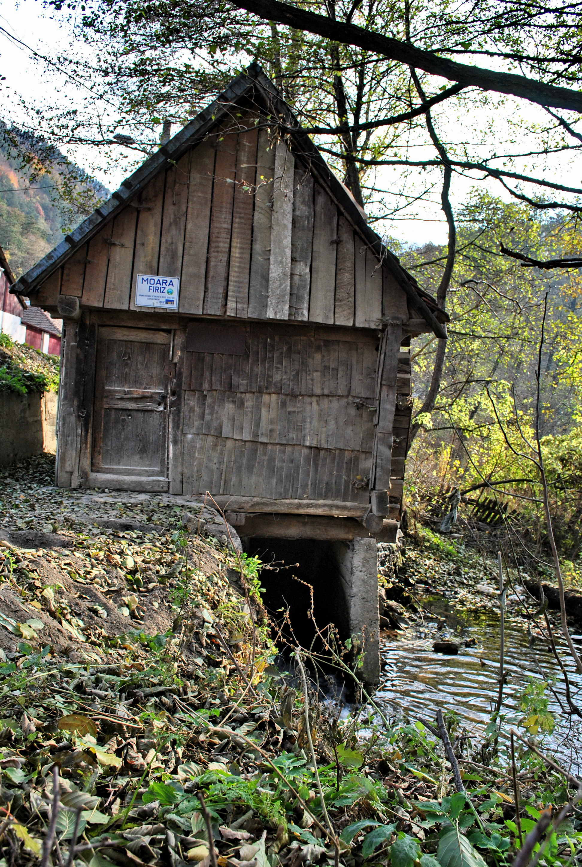 Moara Firizoane 05